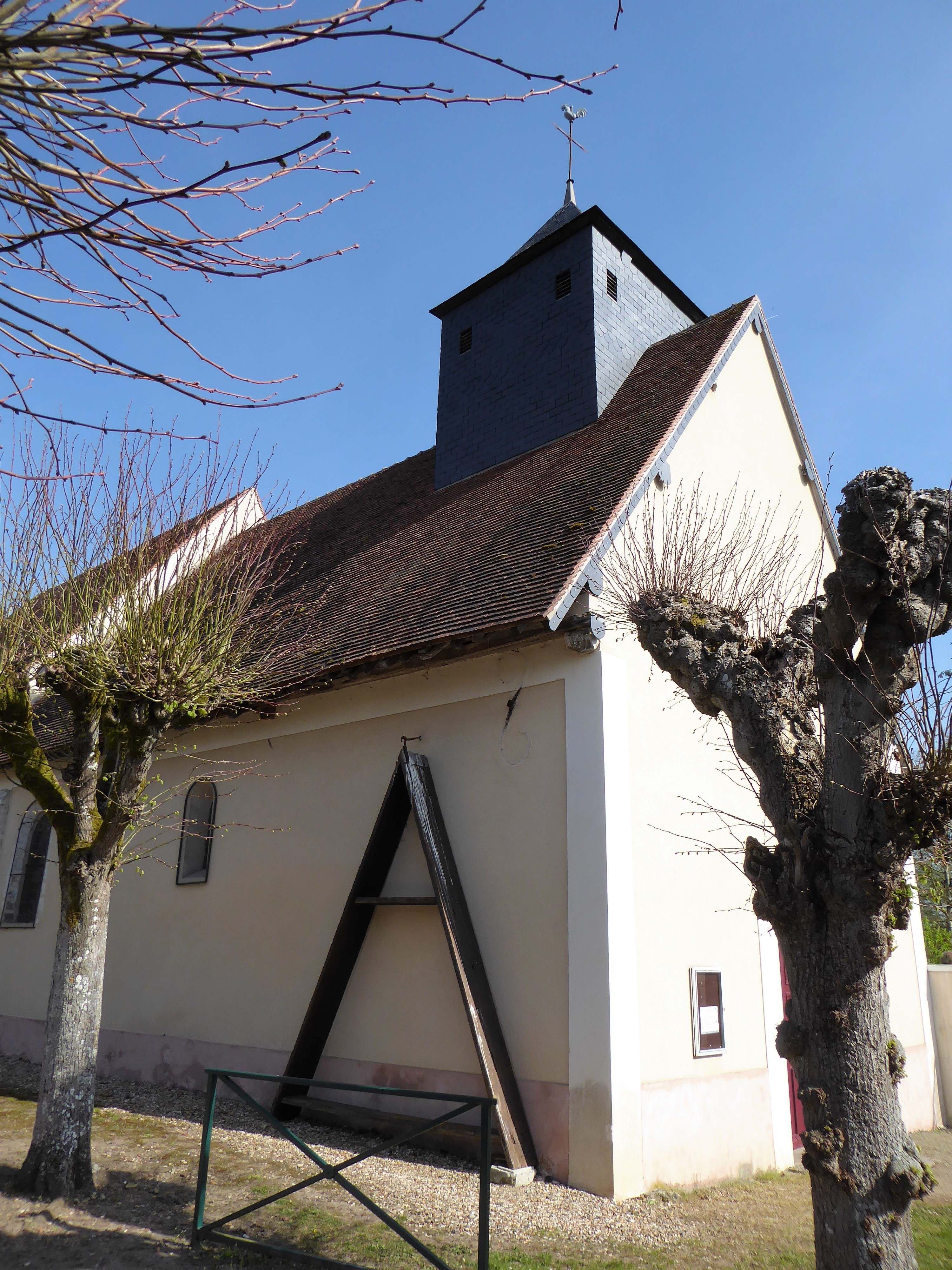 Clocher et mur nord de l'église Saint-Pierre de Saussay, Eure-et-Loir, France.